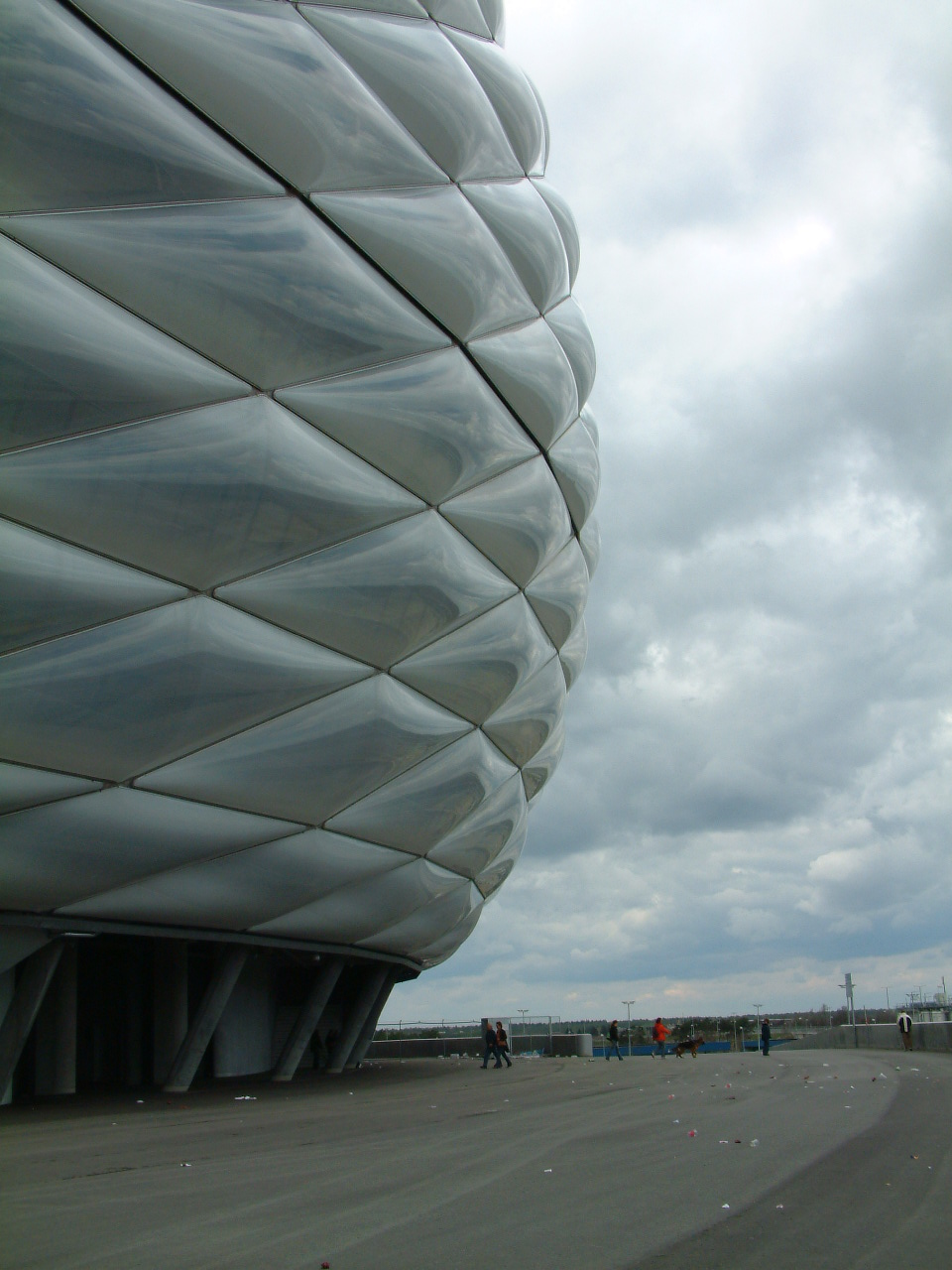 Allianz-Arena, München, Bayern, Deutschland.